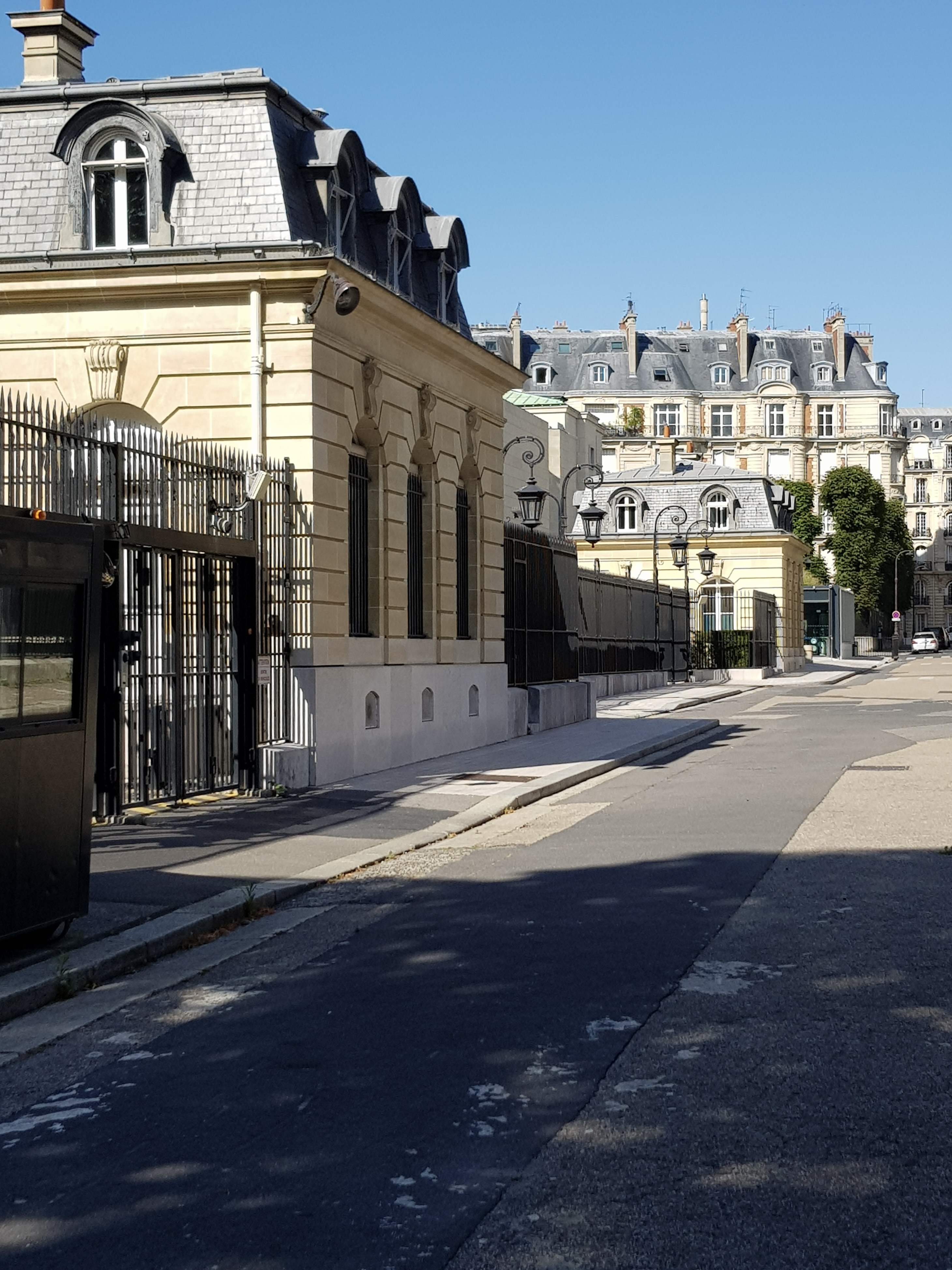 La rue André-Pascal, Paris 16e, vue depuis le jardin du Ranelagh.